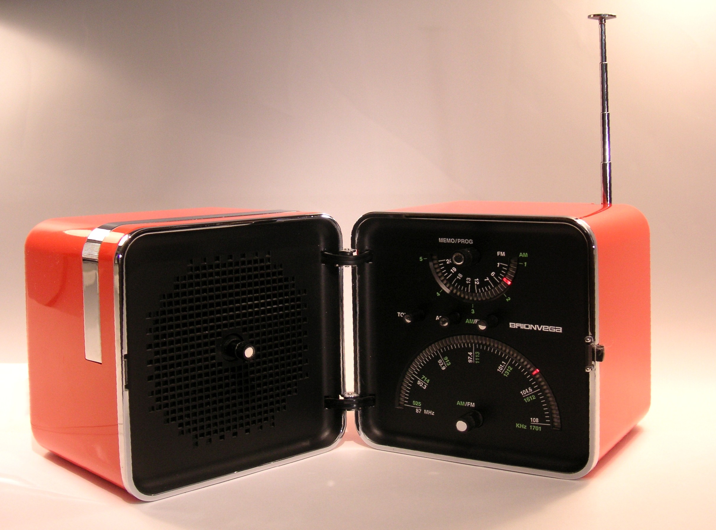 "Klappradio", Brionvega ts 522, Retro 2004